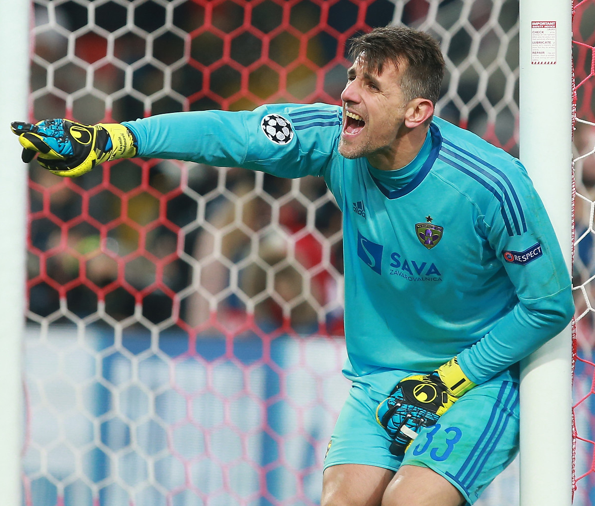 «Спартак» остается в еврокубках